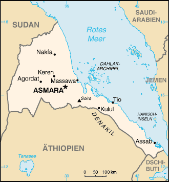 Karte von Eritrea